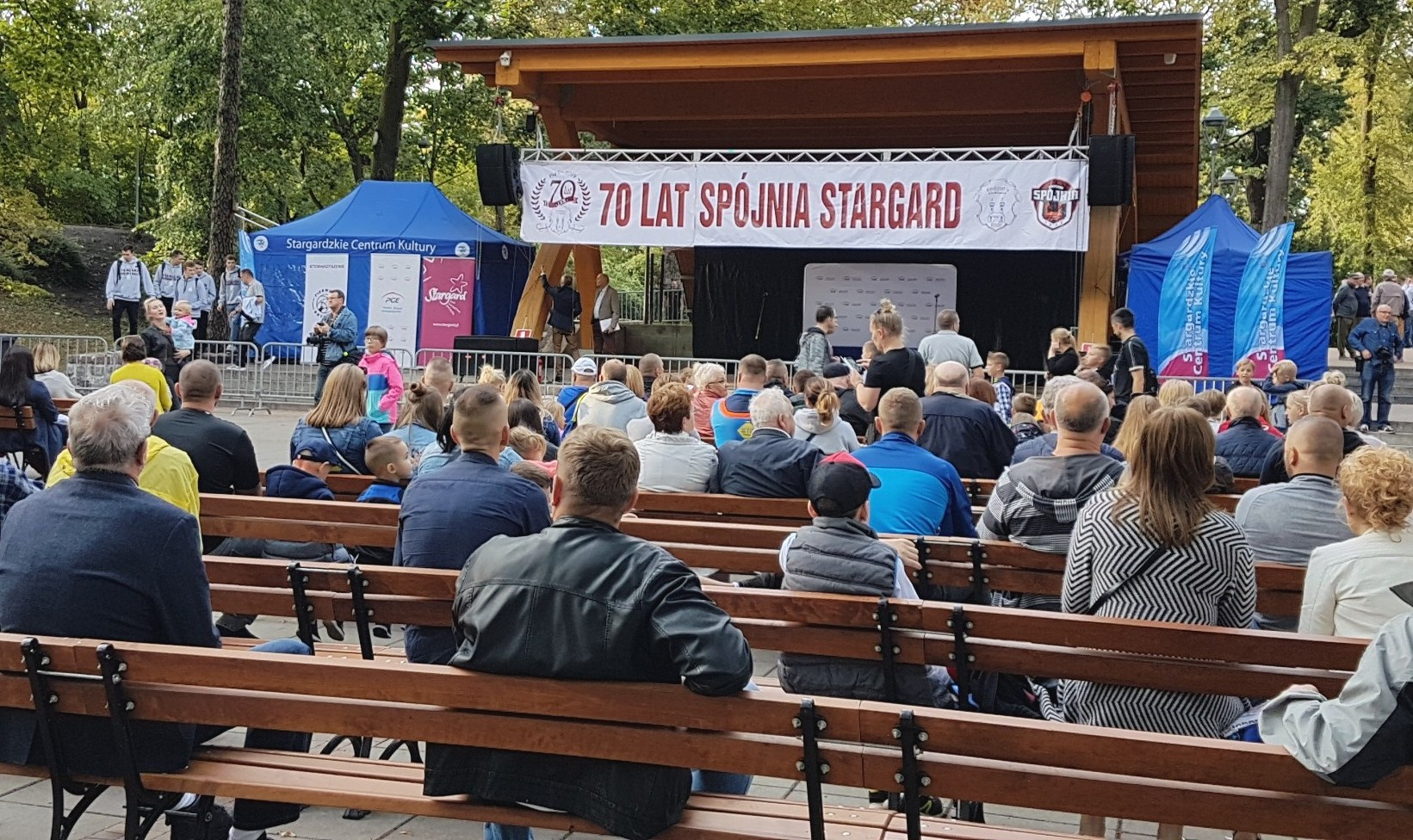 Jubileuszowa Gala na 70-lecie